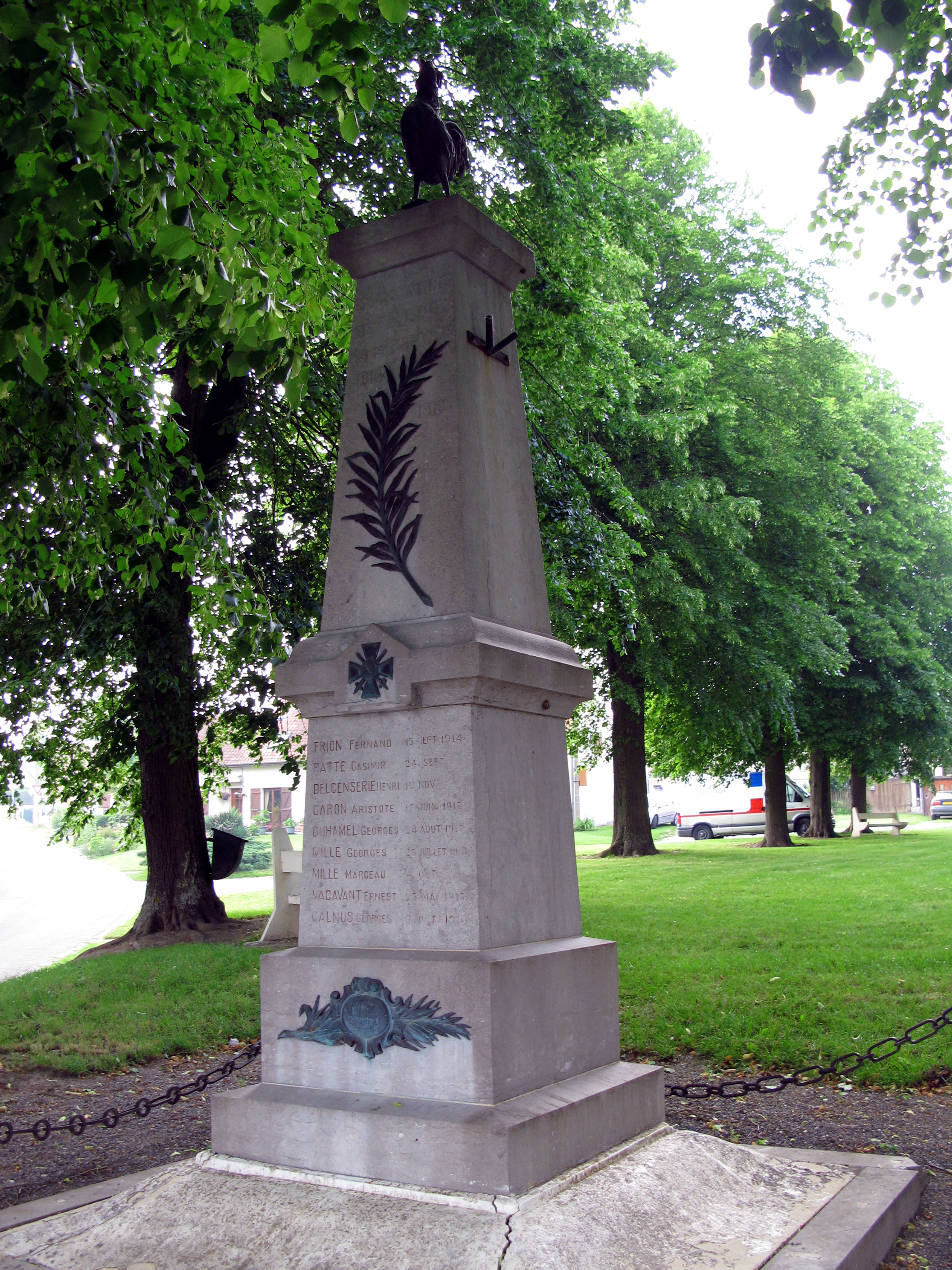 Namps-Maisnil (Somme, France) - Monument aux Morts de Taisnil (village composant désormais, avec d'autres, la commune de Namps-Maisnil). .